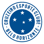 Escudo do Cruzeiro em 1950